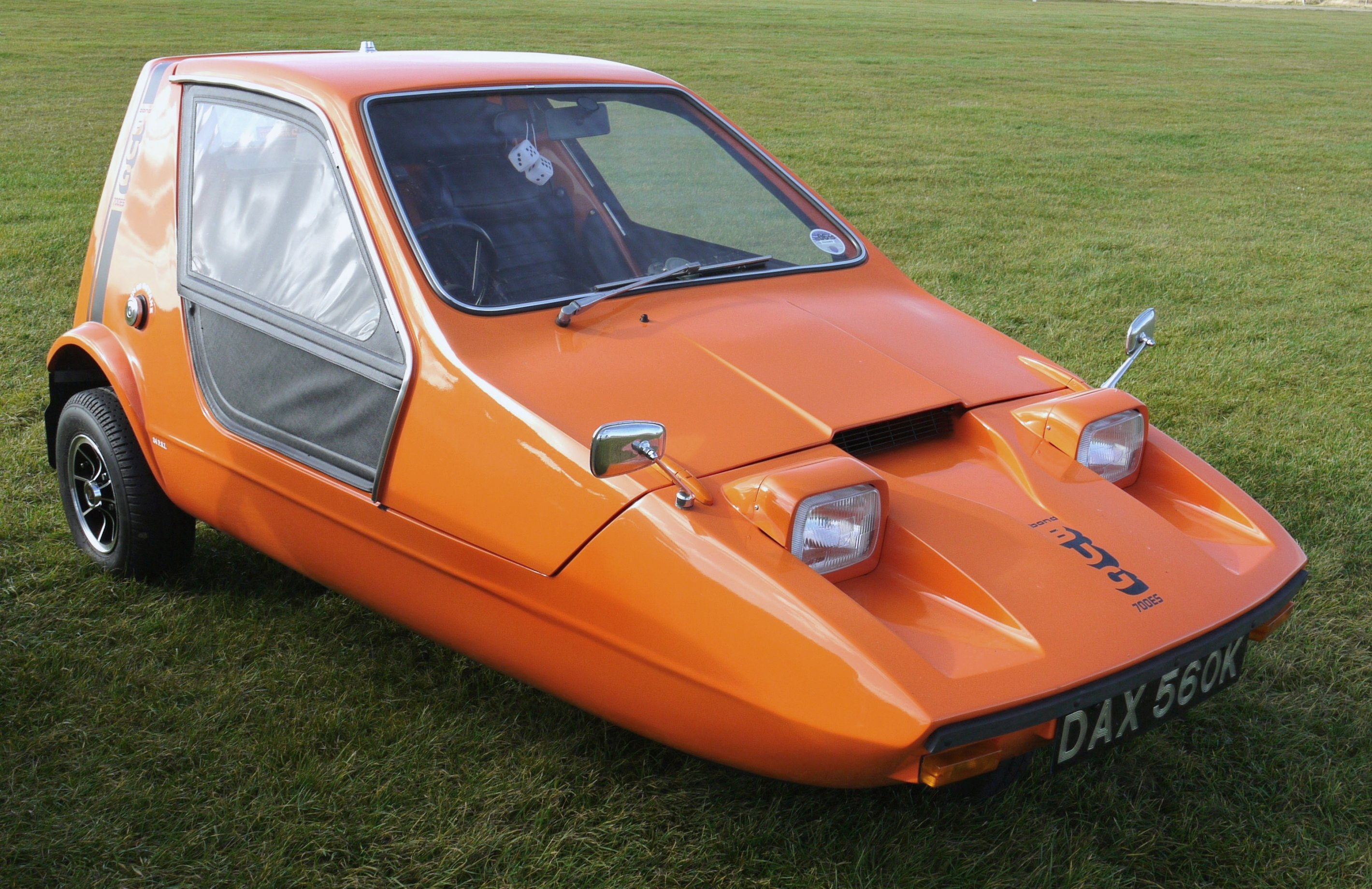 Panasonic G1 14-45 Lens